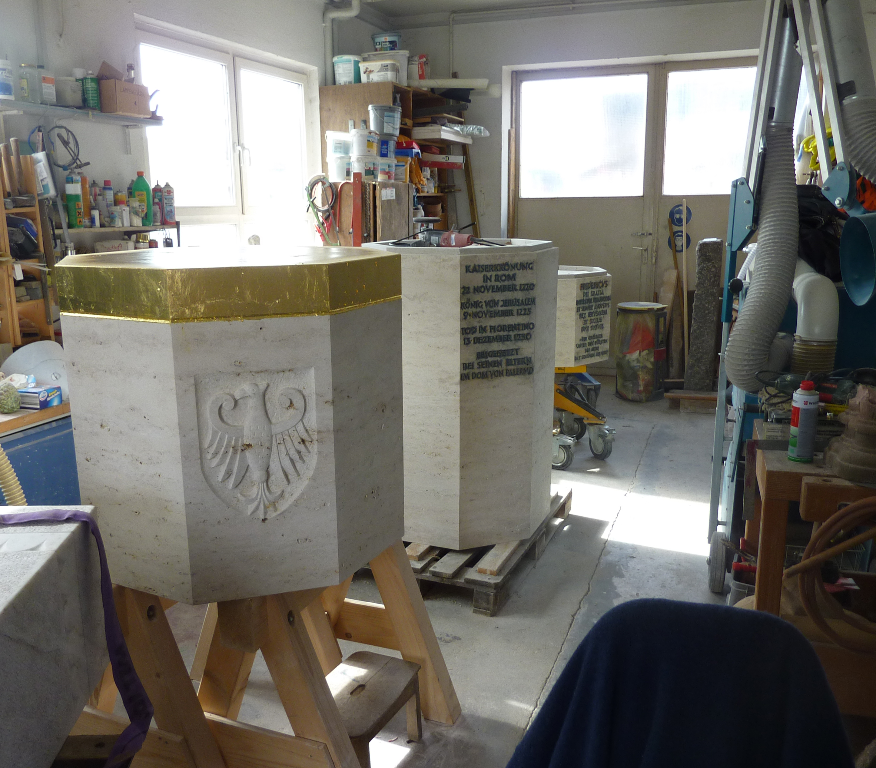 Werkstatt des Bildhauers Markus Wolf in Plieningen